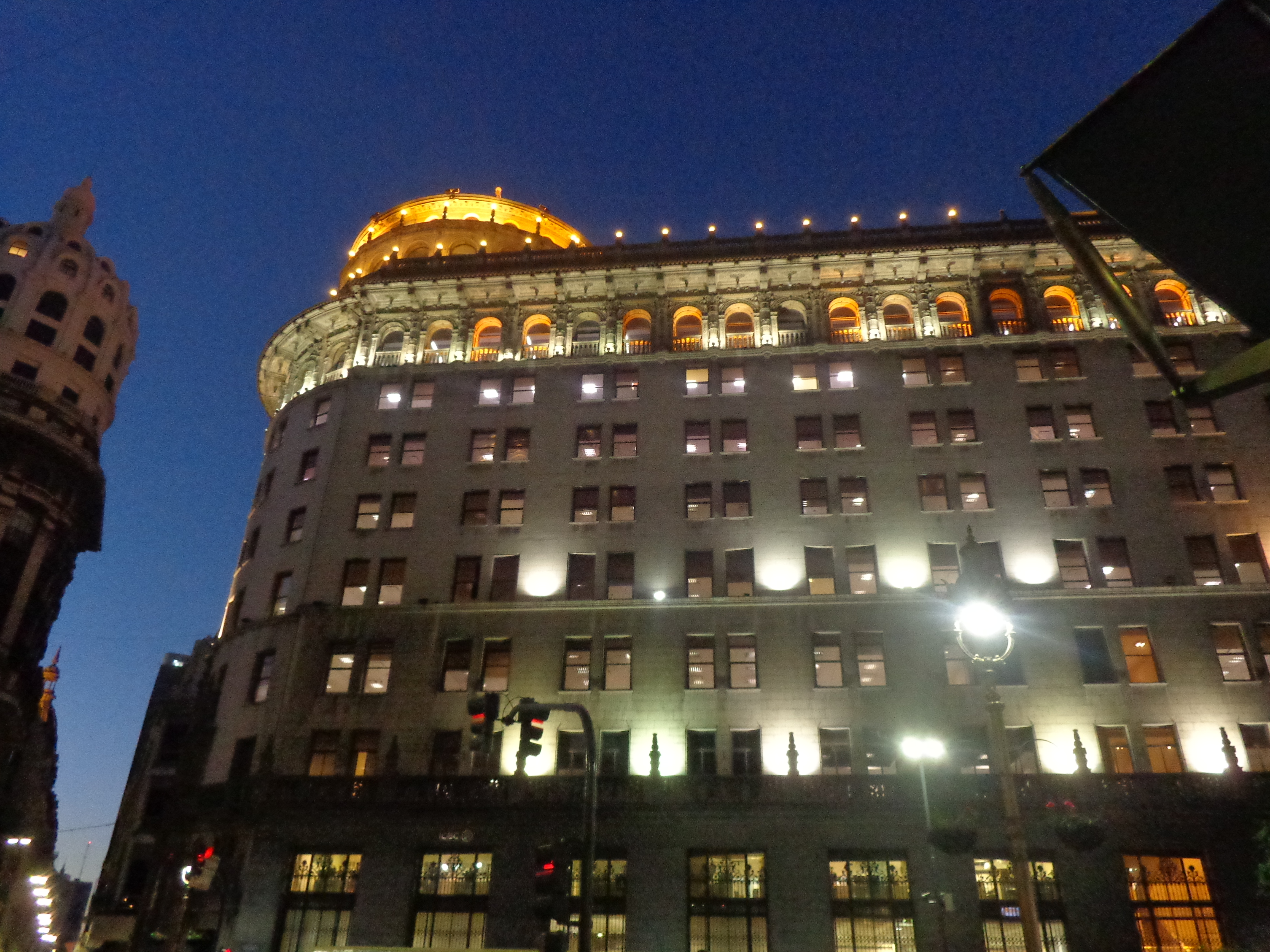 El edificio Banco de Boston (Diagonal Roque Saenz Peña y Florida) iluminado.